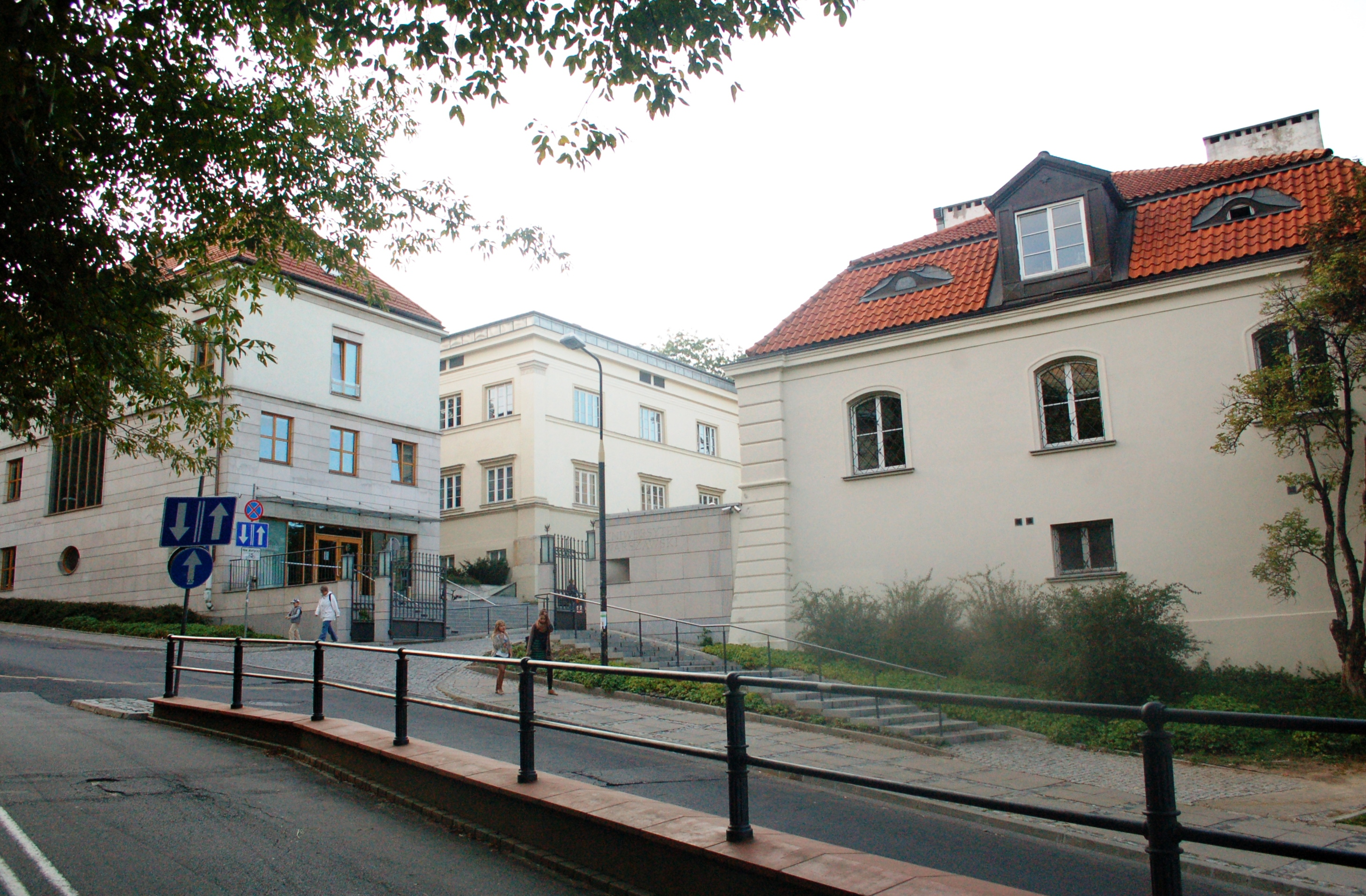 Warschau